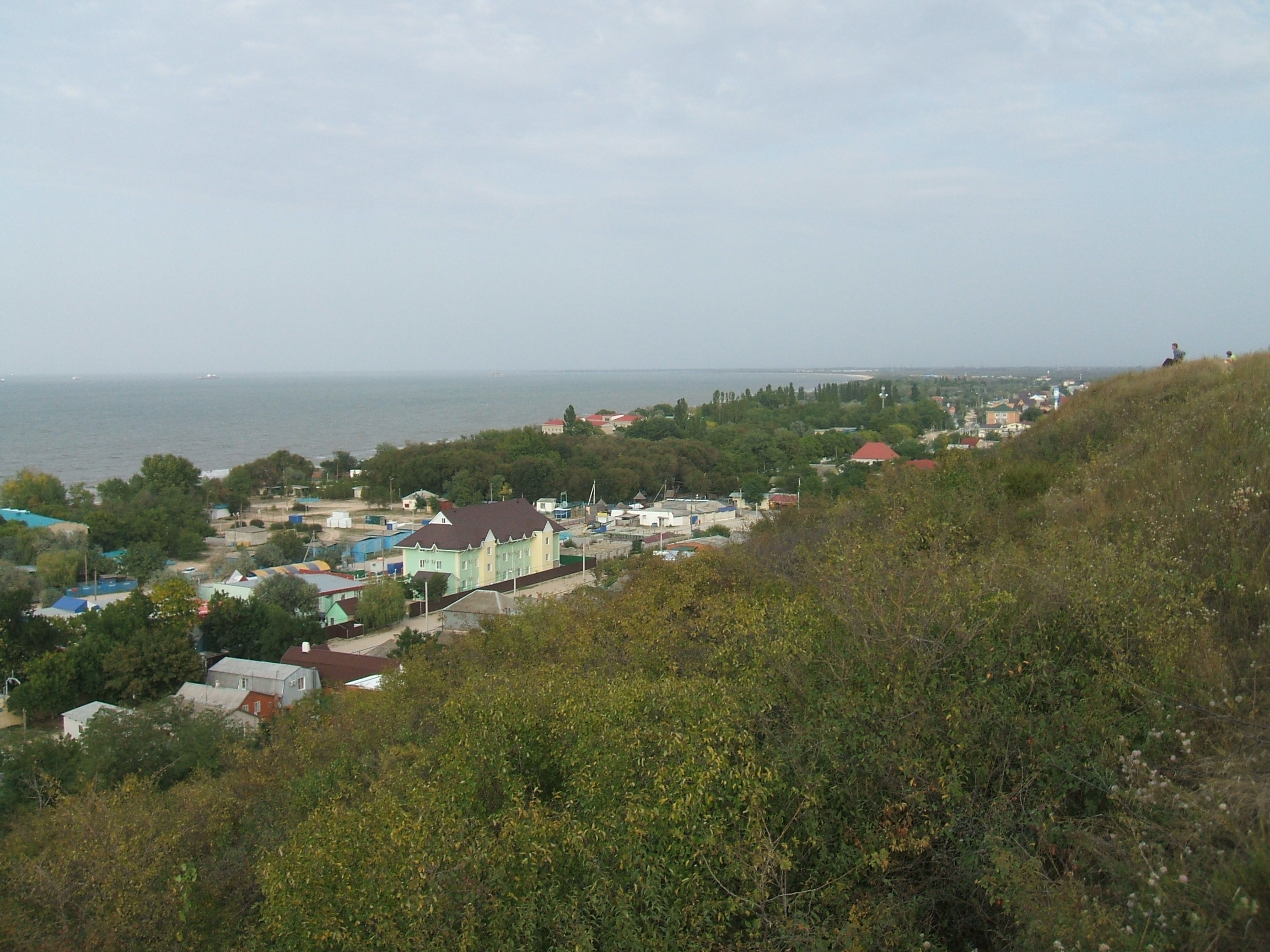 Вид на станицу Голубицкую